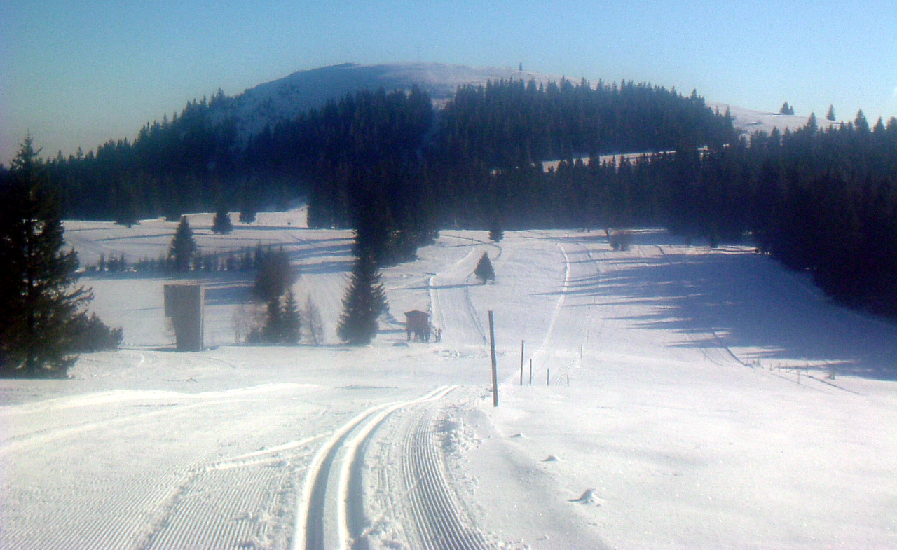 Blick über die Loipe zum Herzogenhorn